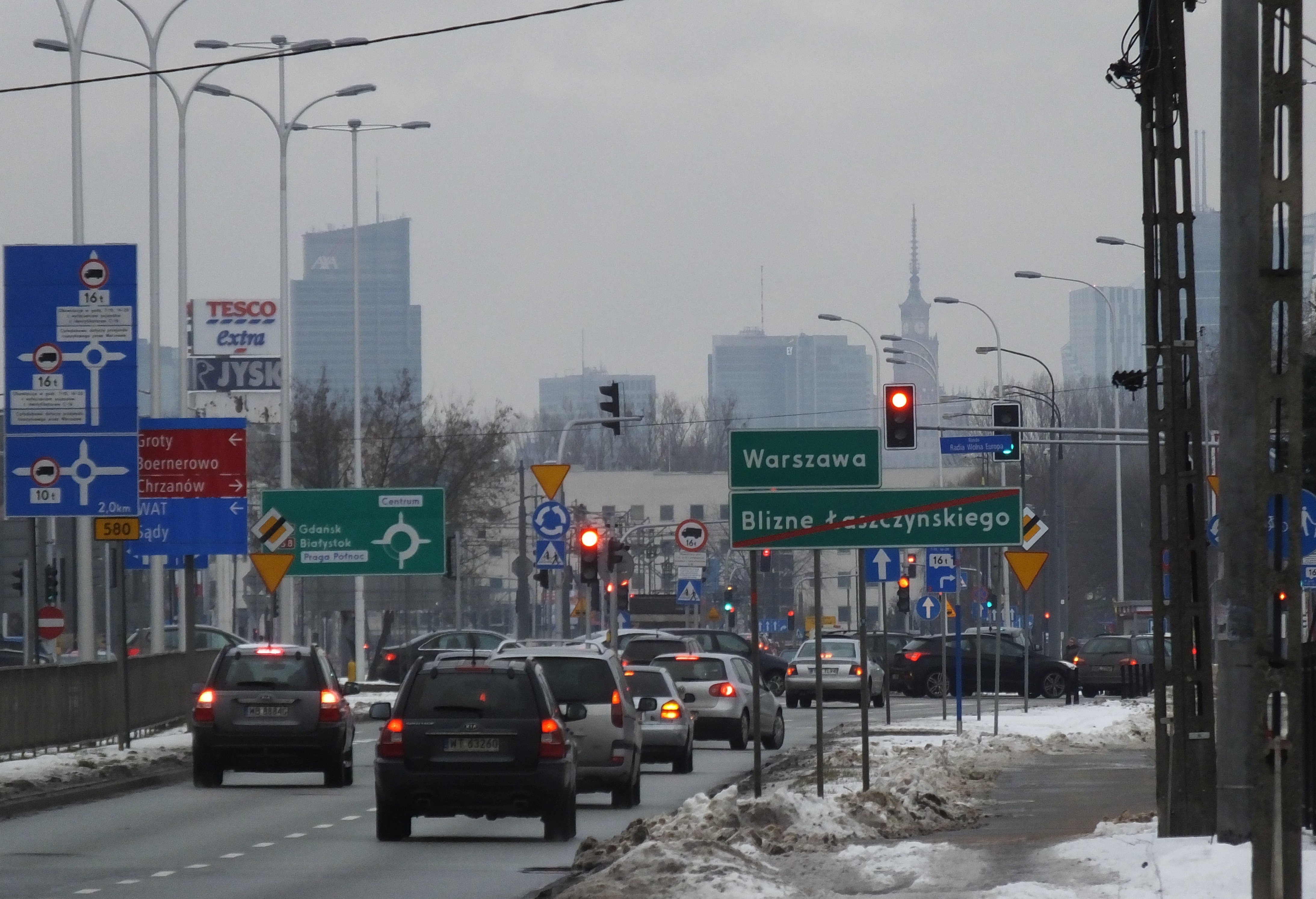 Blizne Łaszczyńskiego.Wjazd do Warszawy ulicą Warszawską.